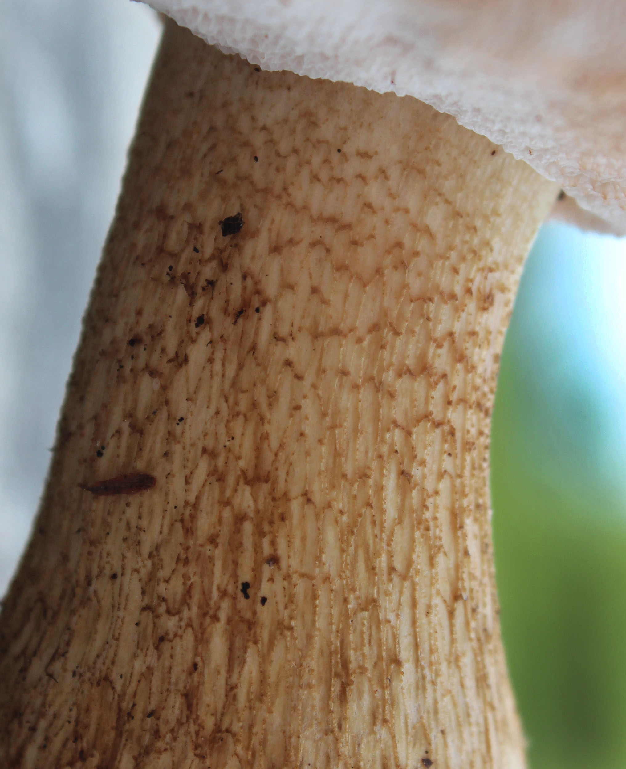 Tylopilus felleus (Bull.) P. Karst.